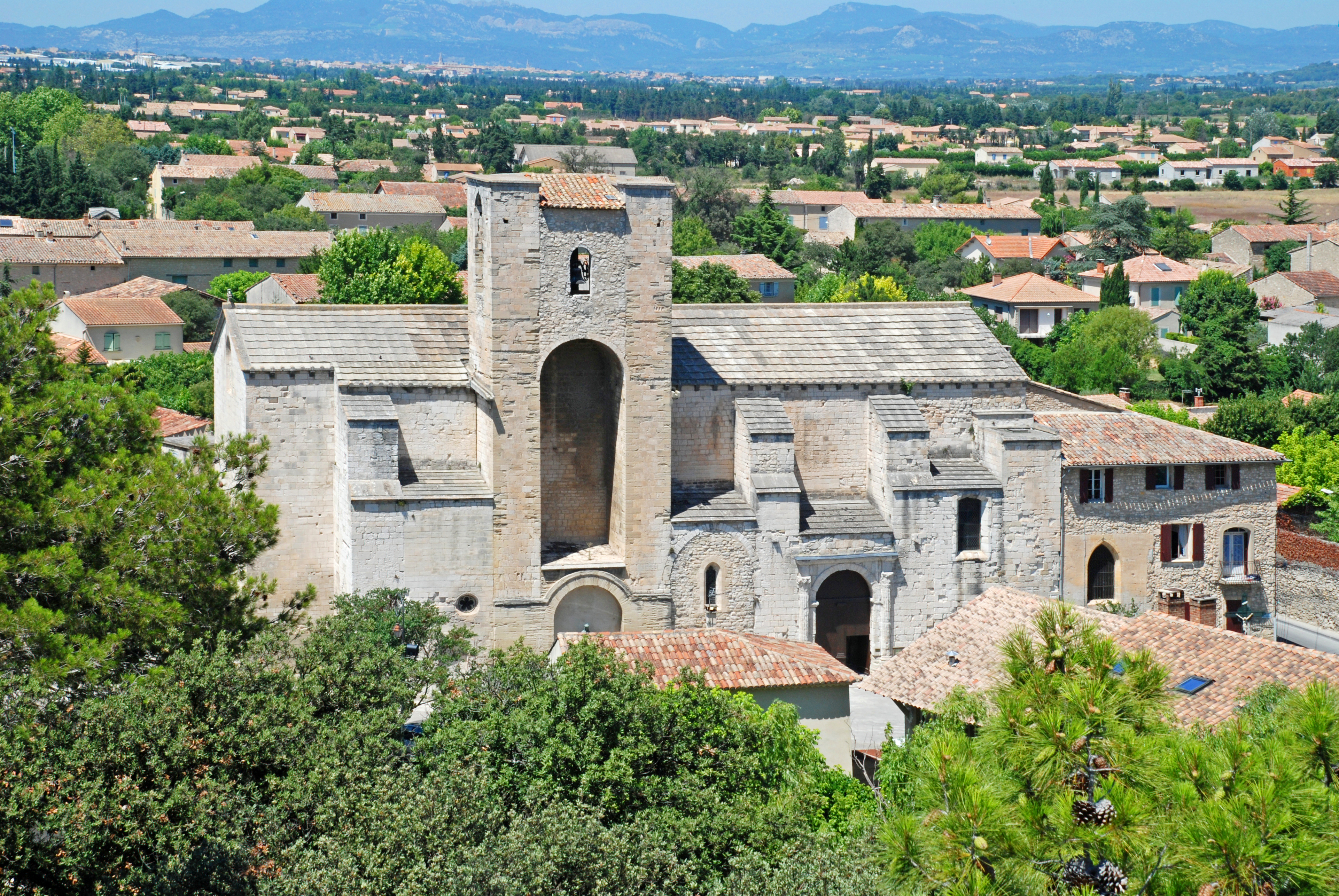 France - Provence - Vaucluse - Pernes-les-Fontaines - Notre-Dame-de-Nazareth